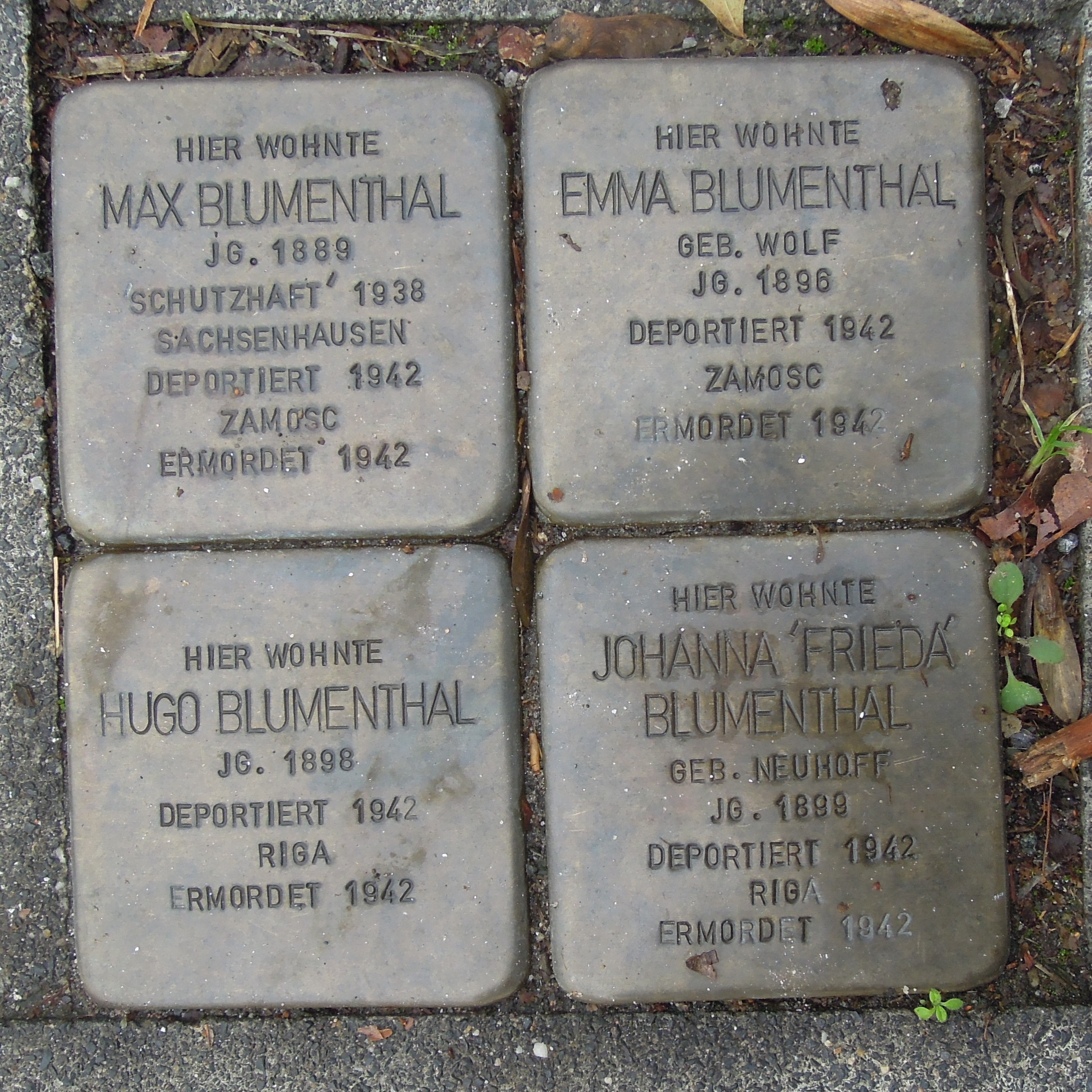 Stolpersteine Castrop-Rauxel Holzstr 18